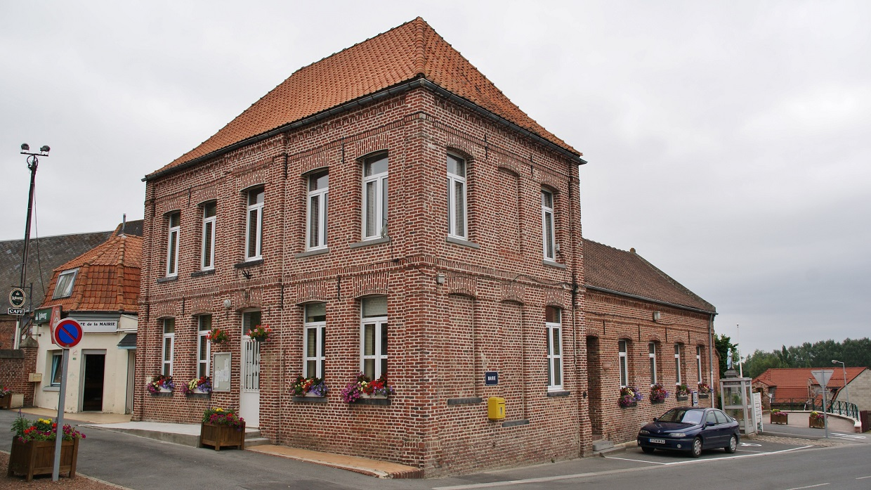 La Mairie